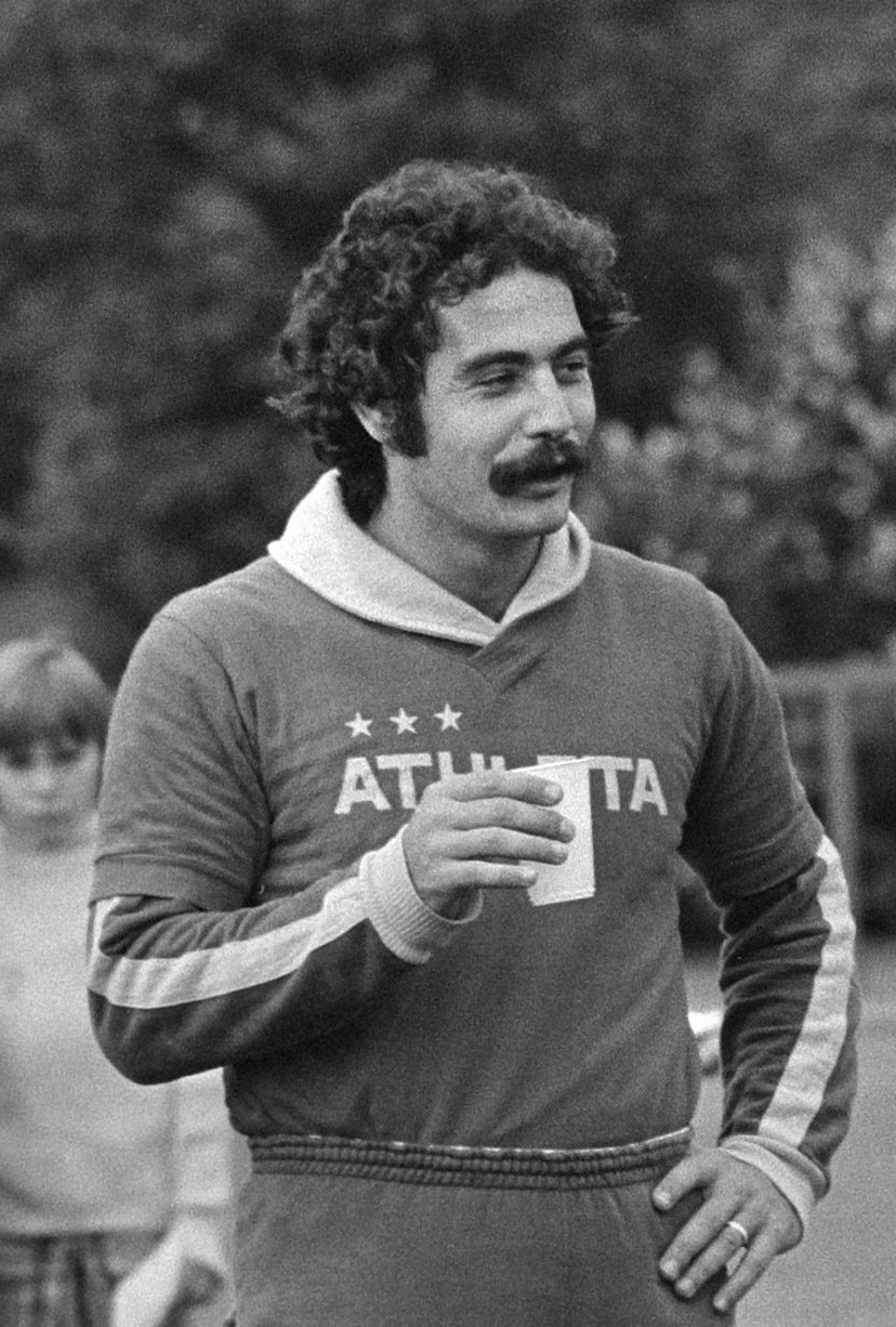 WK 74, training Brazilie; Roberto Rivelino